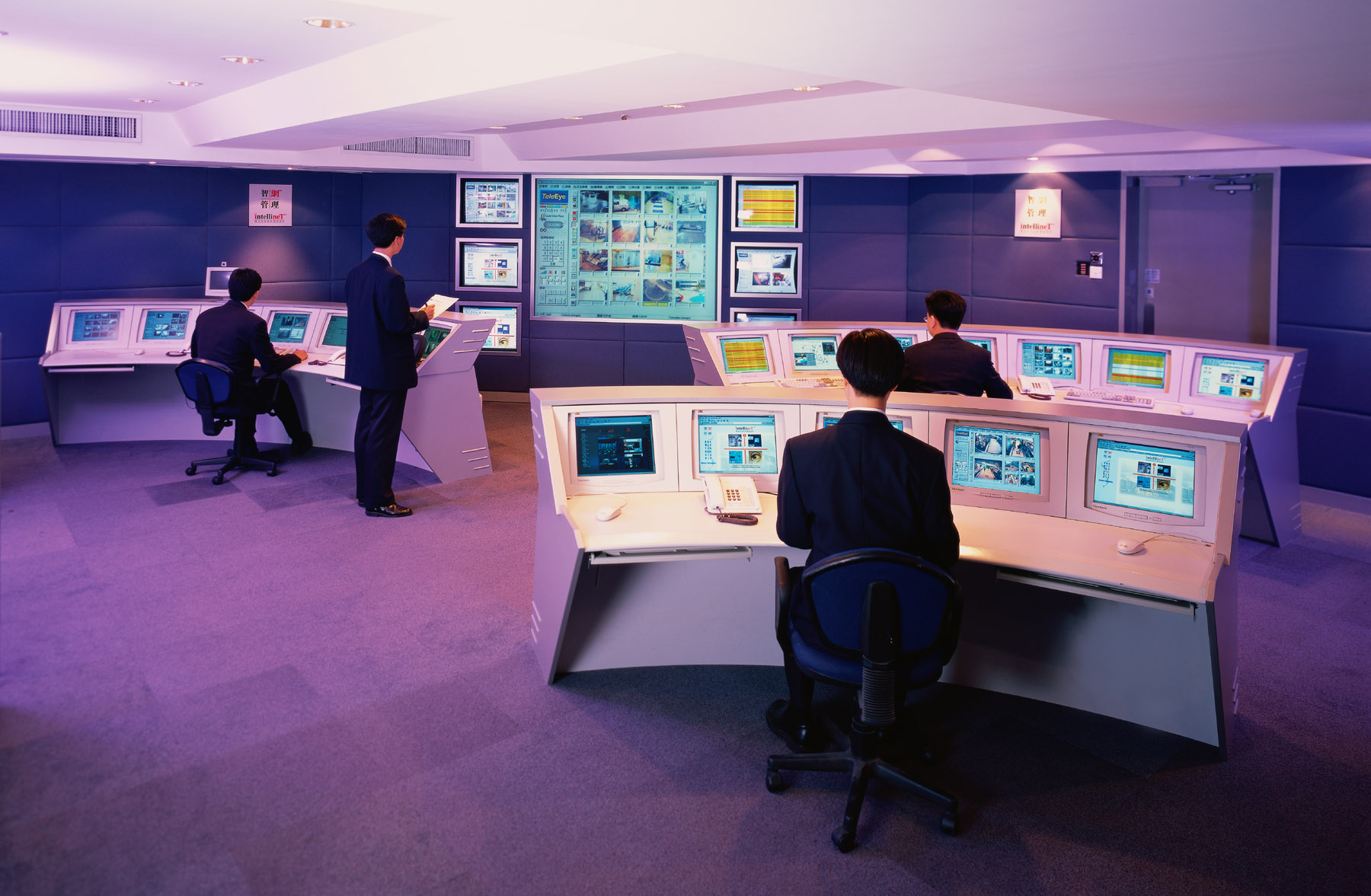 工作中心